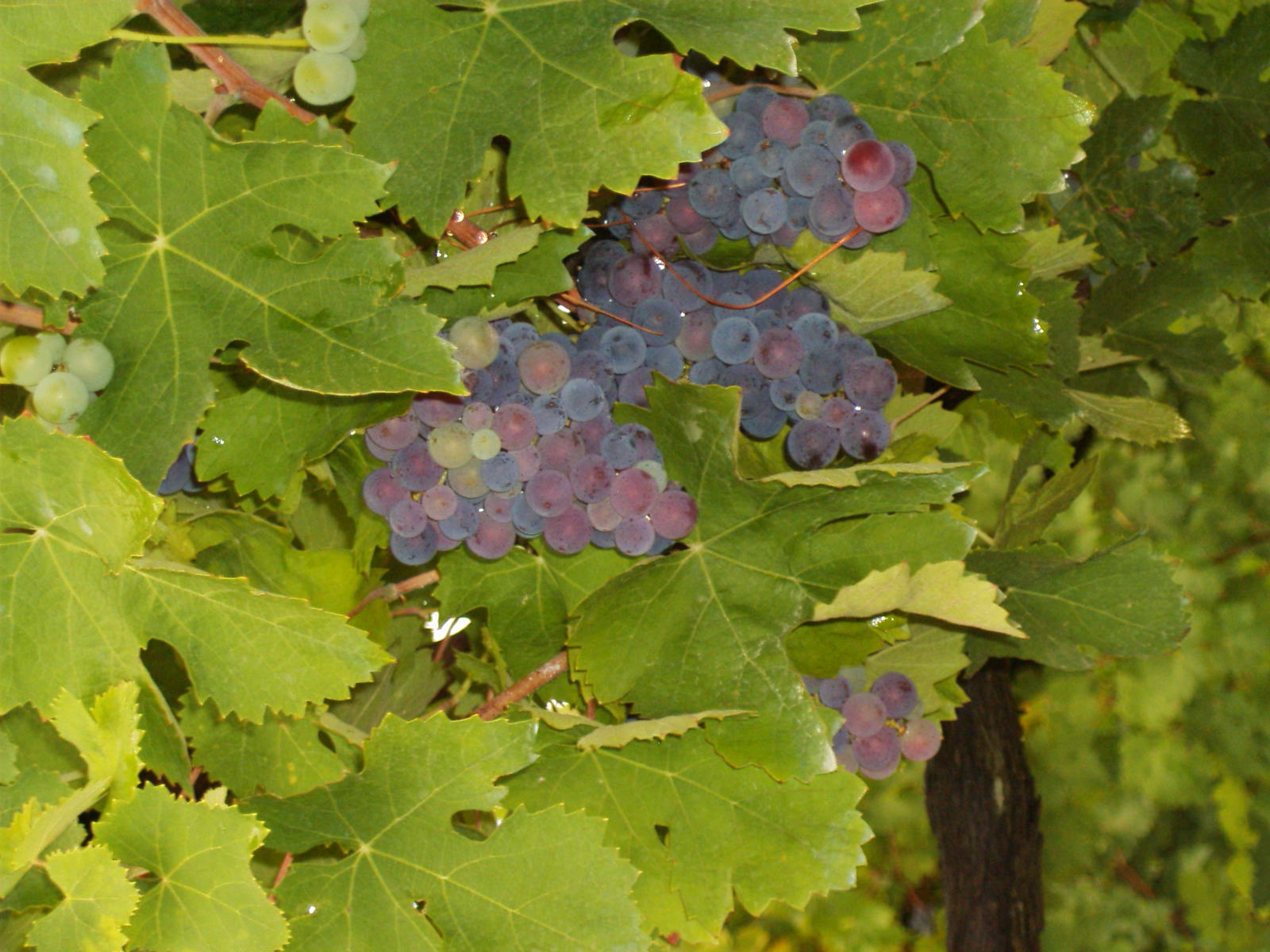 Weinreben in Italien